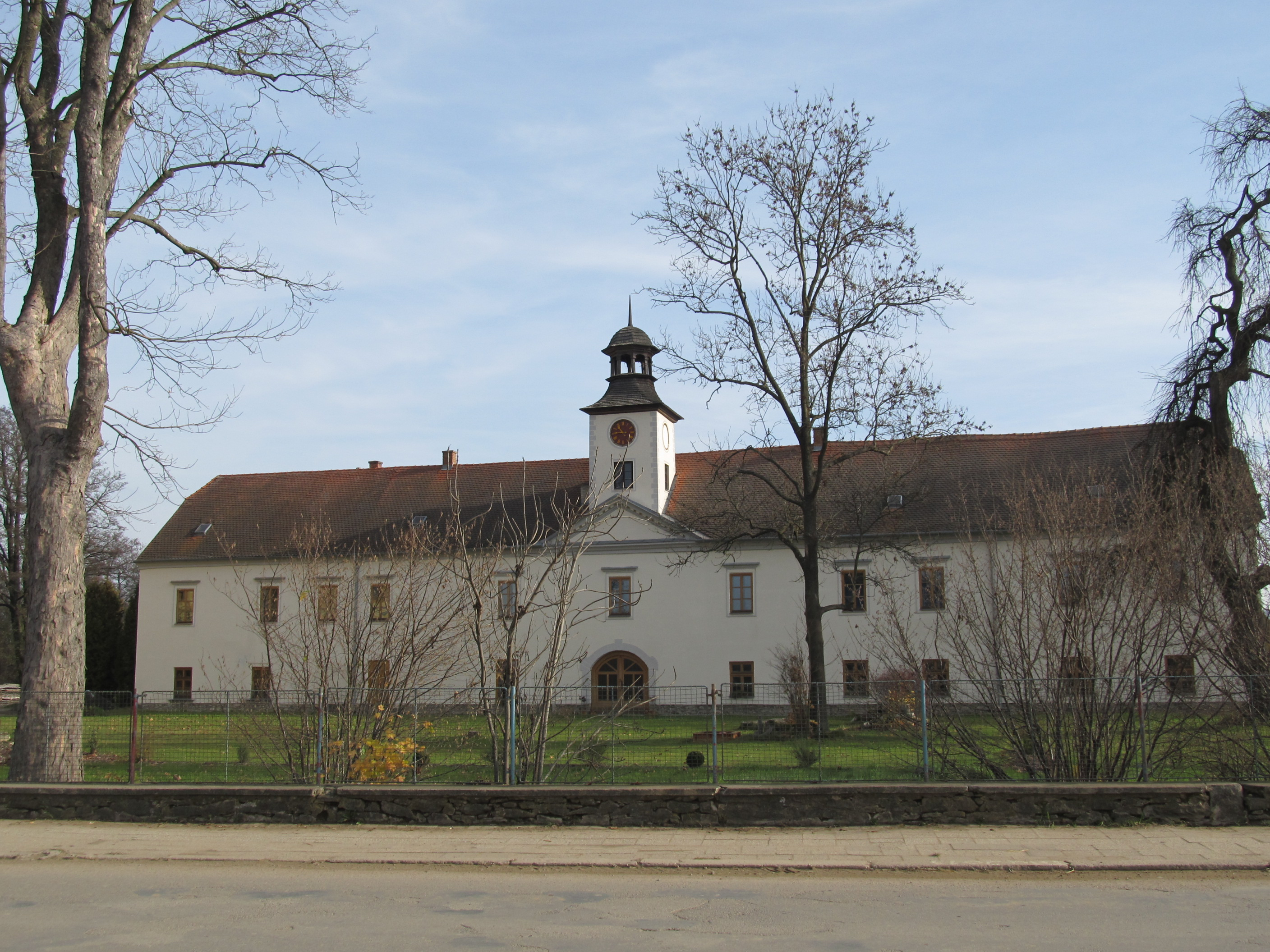 Batelov - Starý zámek